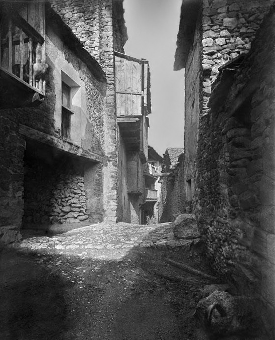 Imatge